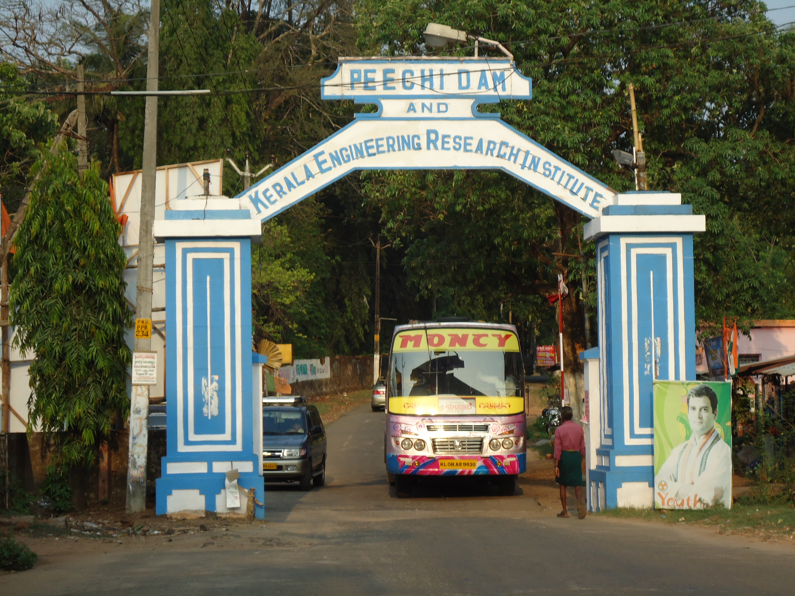 Peechi Dam Entrance